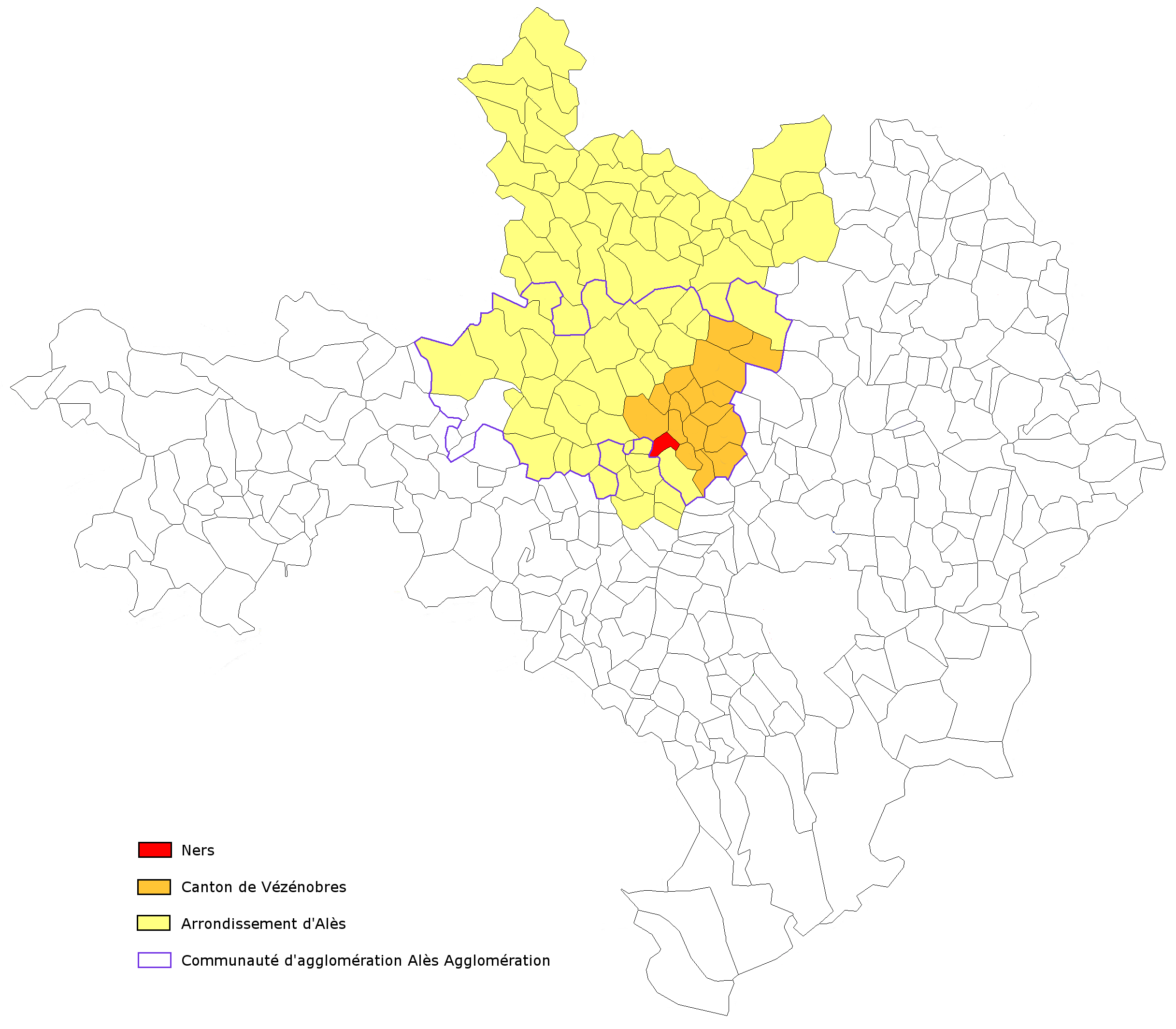 Divisions administratives des collectivités territoriales auxquelles appartient la commune de Ners.